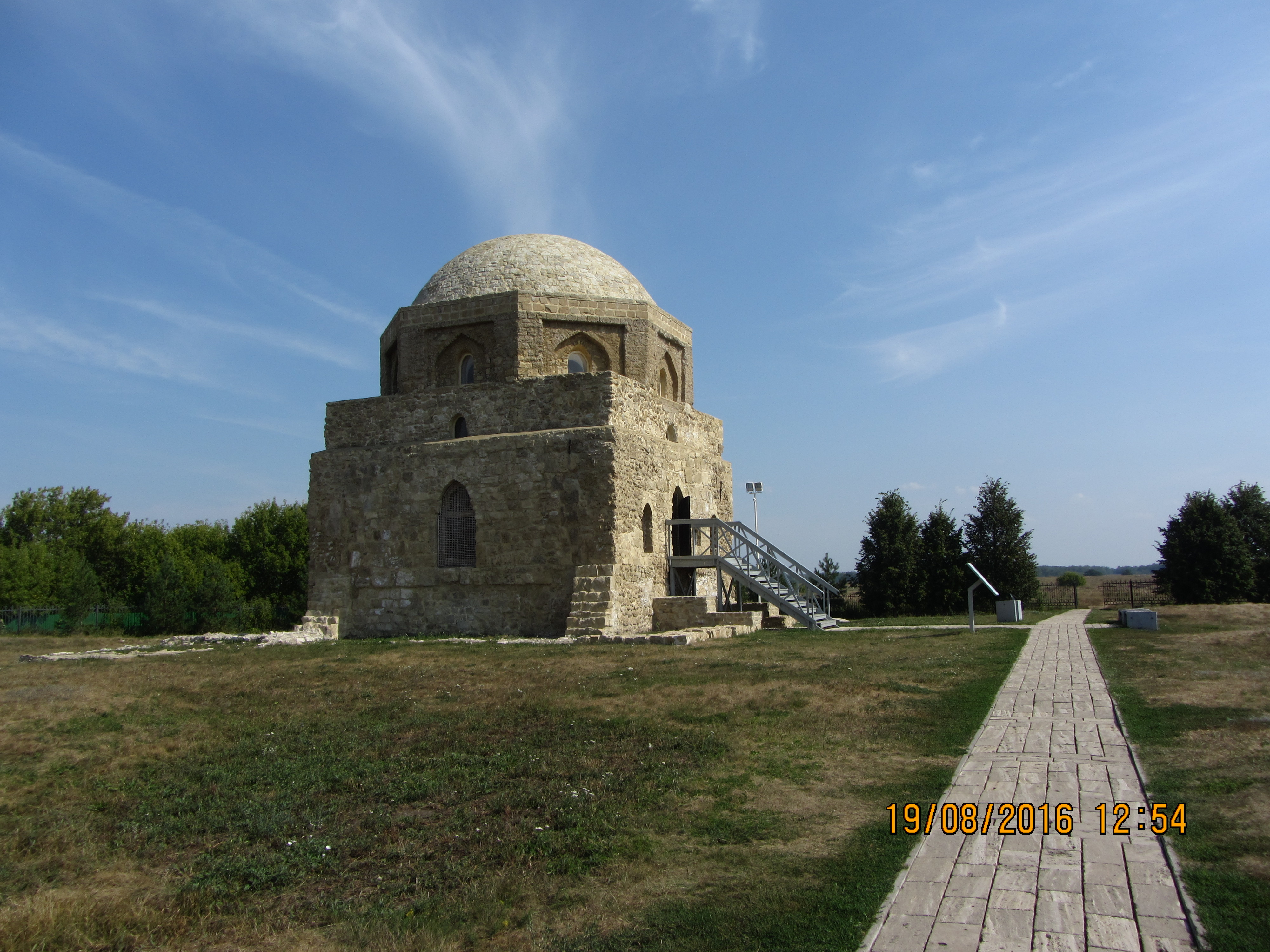 Черная палата: городище, Болгары, Спасский район, Татарстан